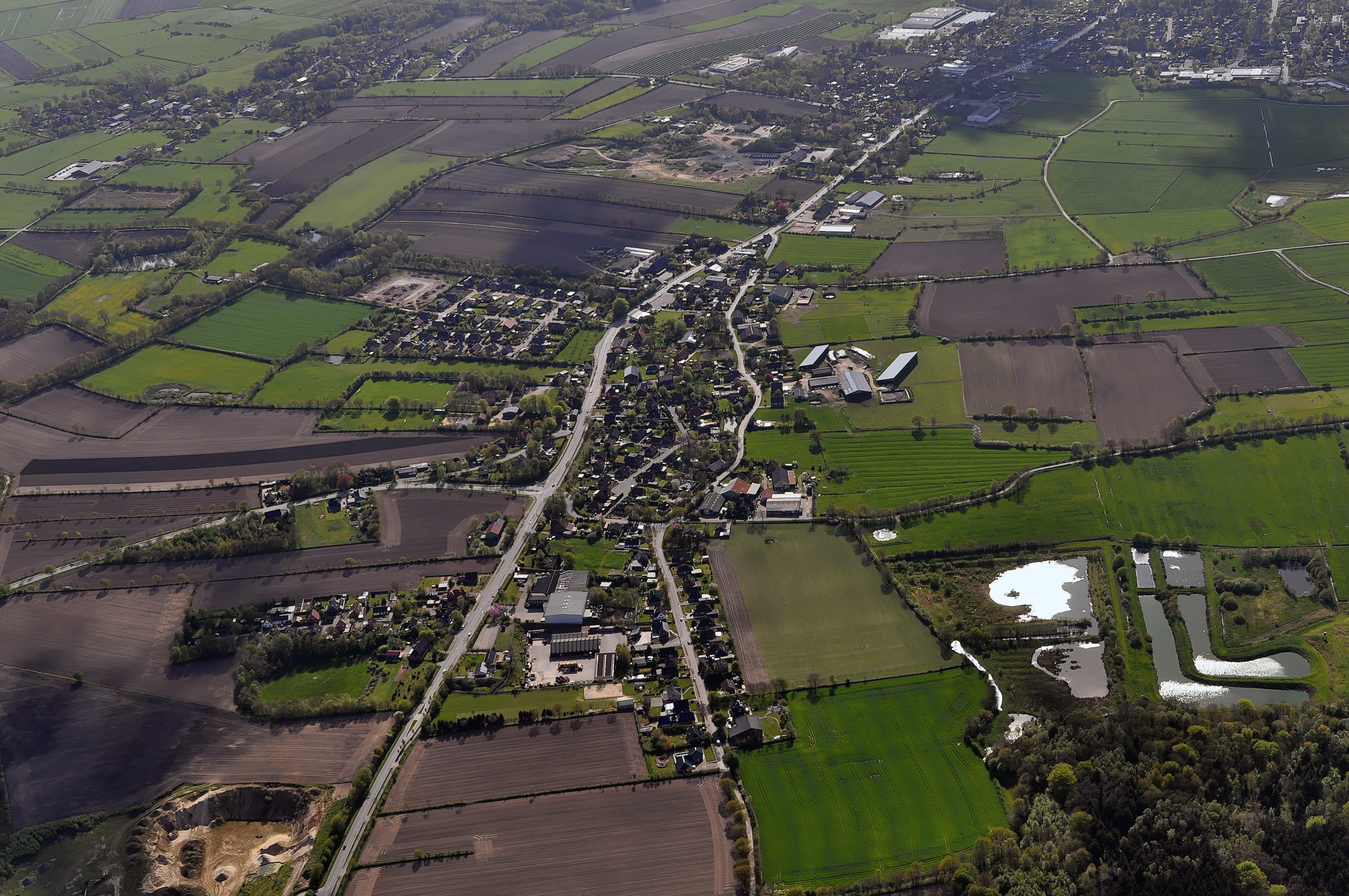 Luftbilder von der Nordseeküste 2012-05